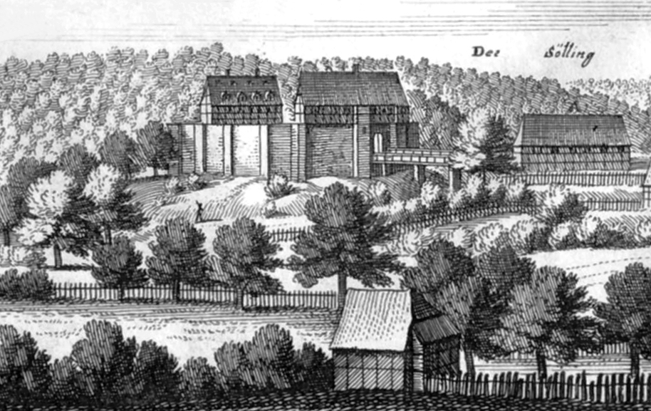 Jagdschloss Nienover